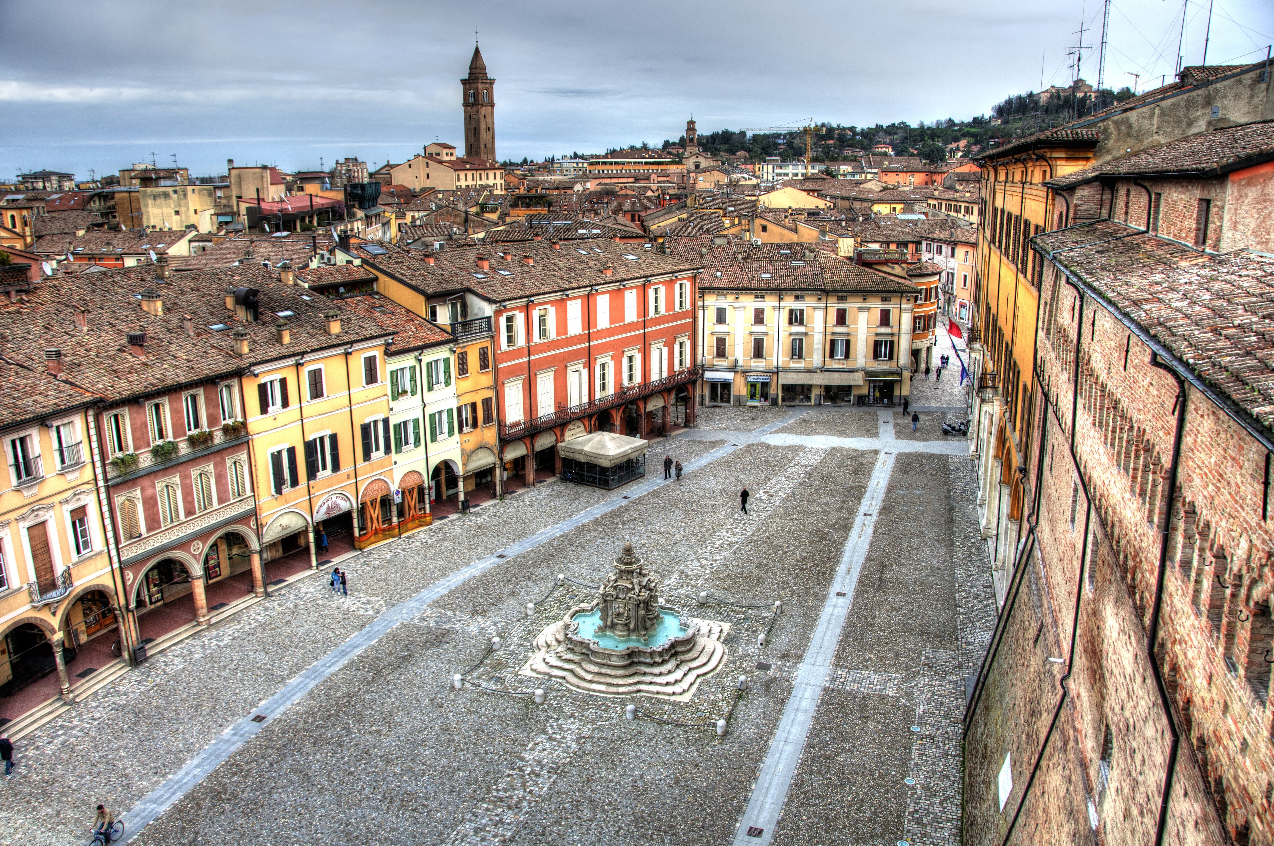 Fontana Masini This is a photo of a monument which is part of cultural heritage of Italy.